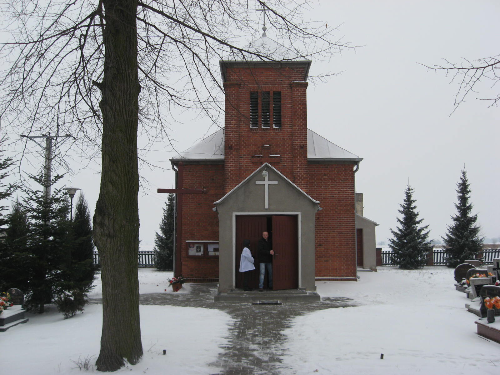 Kościół cmentarny św. Jana Chrzciciela w Sarnowie